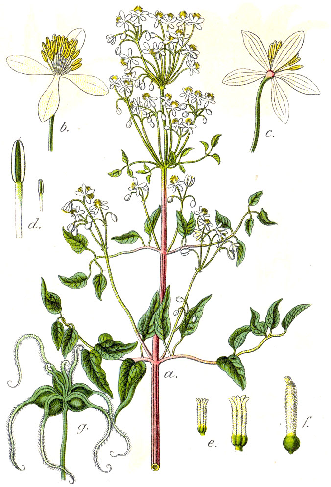 Clematis recta L., syn. Anemone recta (L.) K.Krause Original Description Aufrechte Klematis, Anemone recta